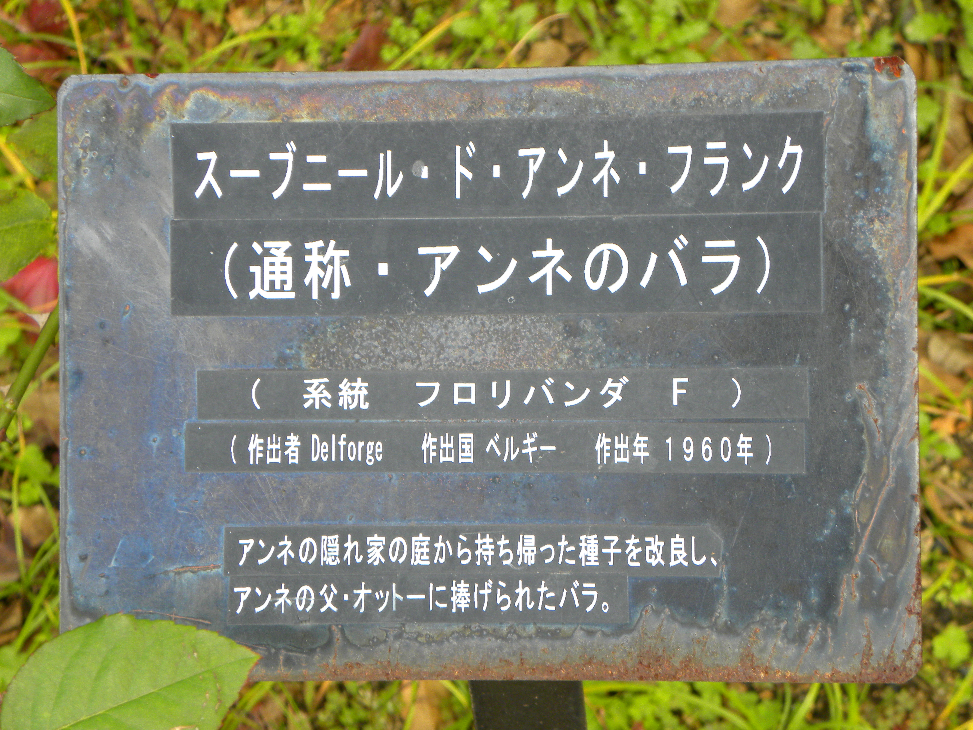 「アンネのバラ」の由来の説明